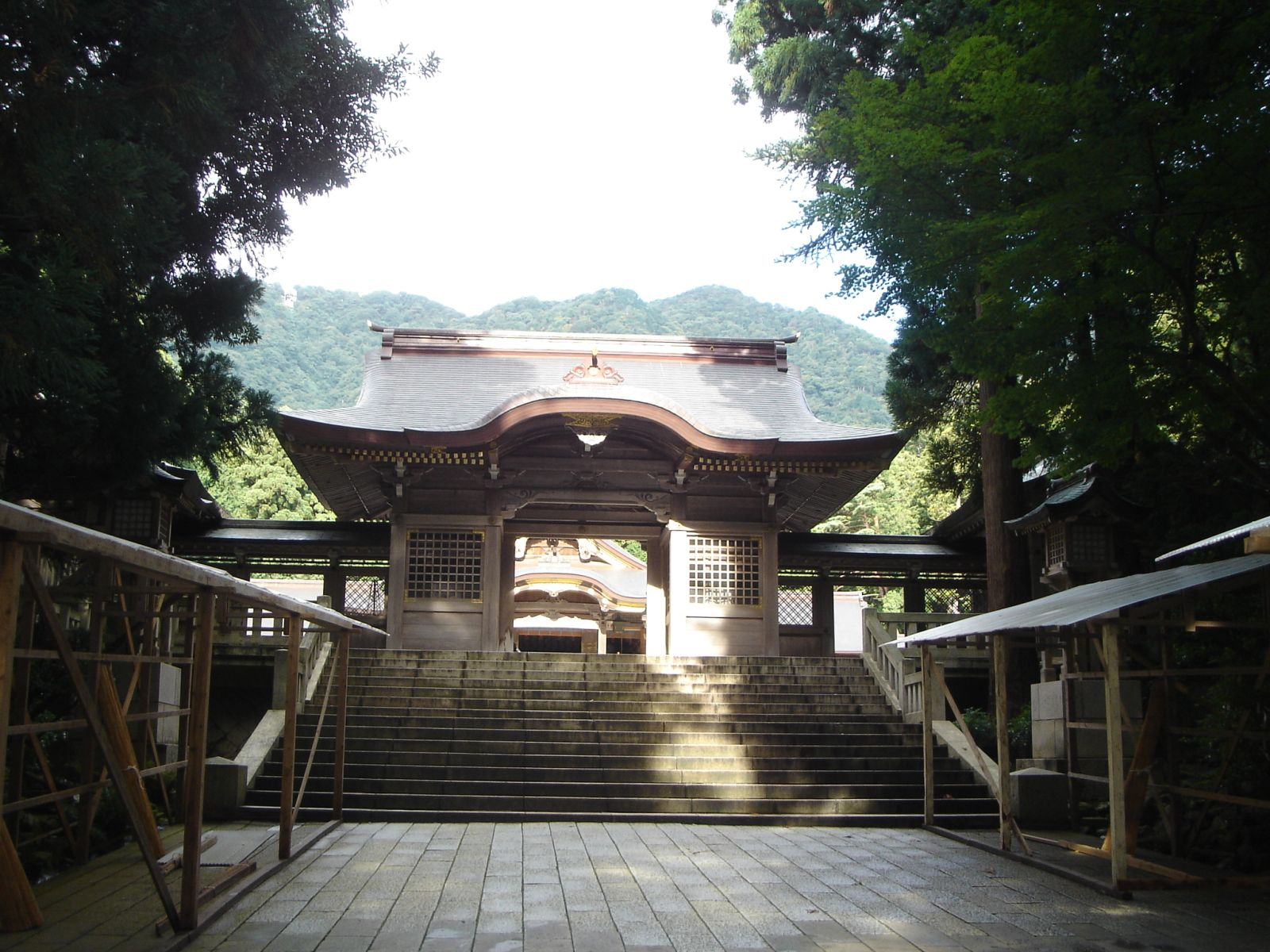 弥彦神社随神門、新潟県弥彦村